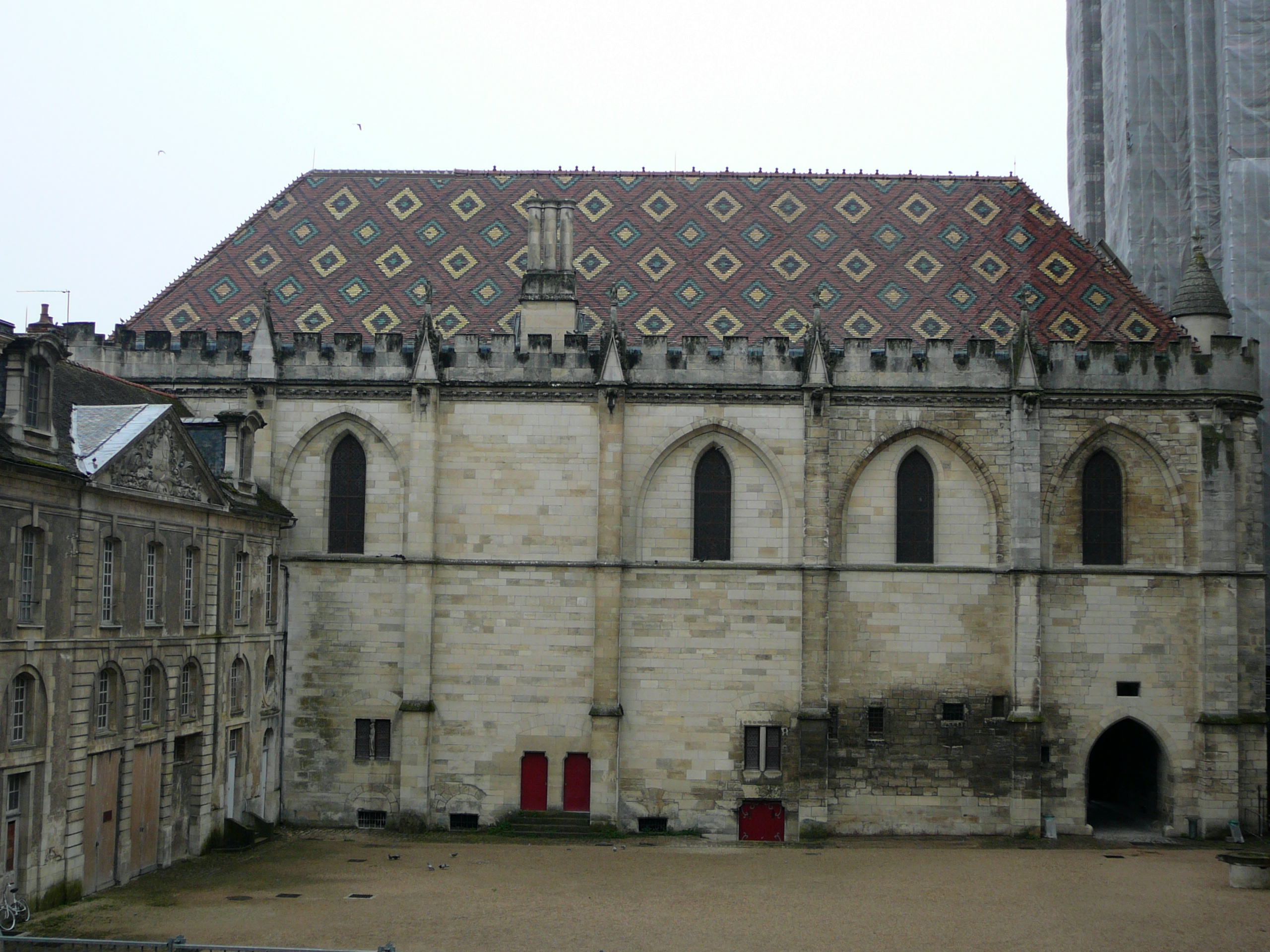 Palais synodal de Sens XIIIème siècle